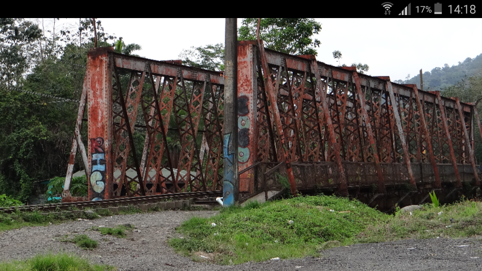 Uniao